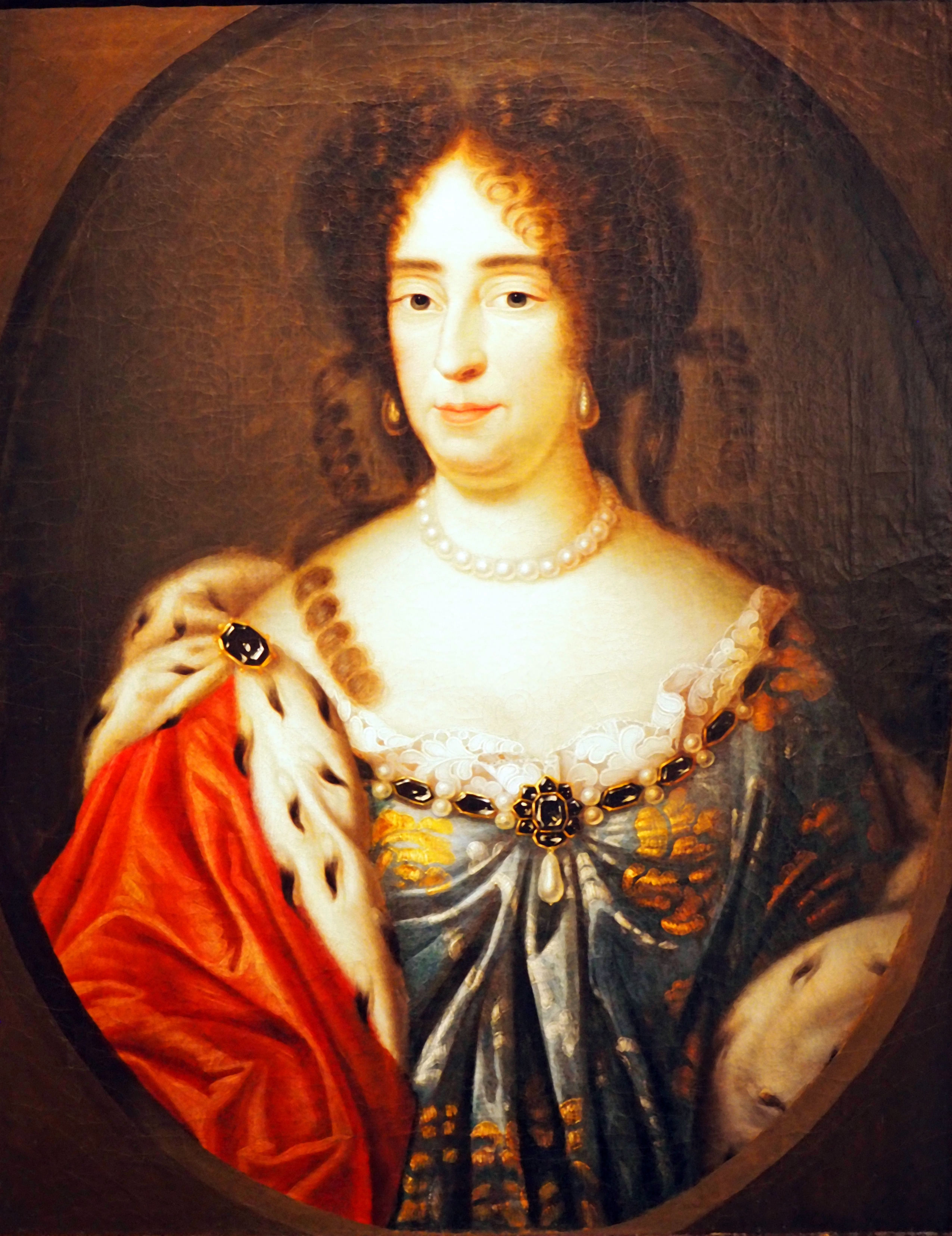 Dorothea Sophie, Prinzessin von Schleswig Holstein-Sonderburg-Glücksburg, 1653 Herzogin von Braunschweig und Lüneburg, 1668 Kurfürstin von Brandenburg